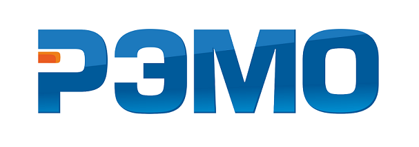 Новый логотип РЭМО (2019 г.)